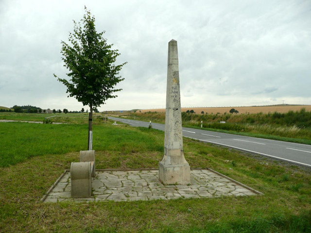 Das Bild zeigt die Ganzmeilensäule Nr. 8 (1729) der Alten Dresden-Teplitzer Poststraße nahe Meusegast.